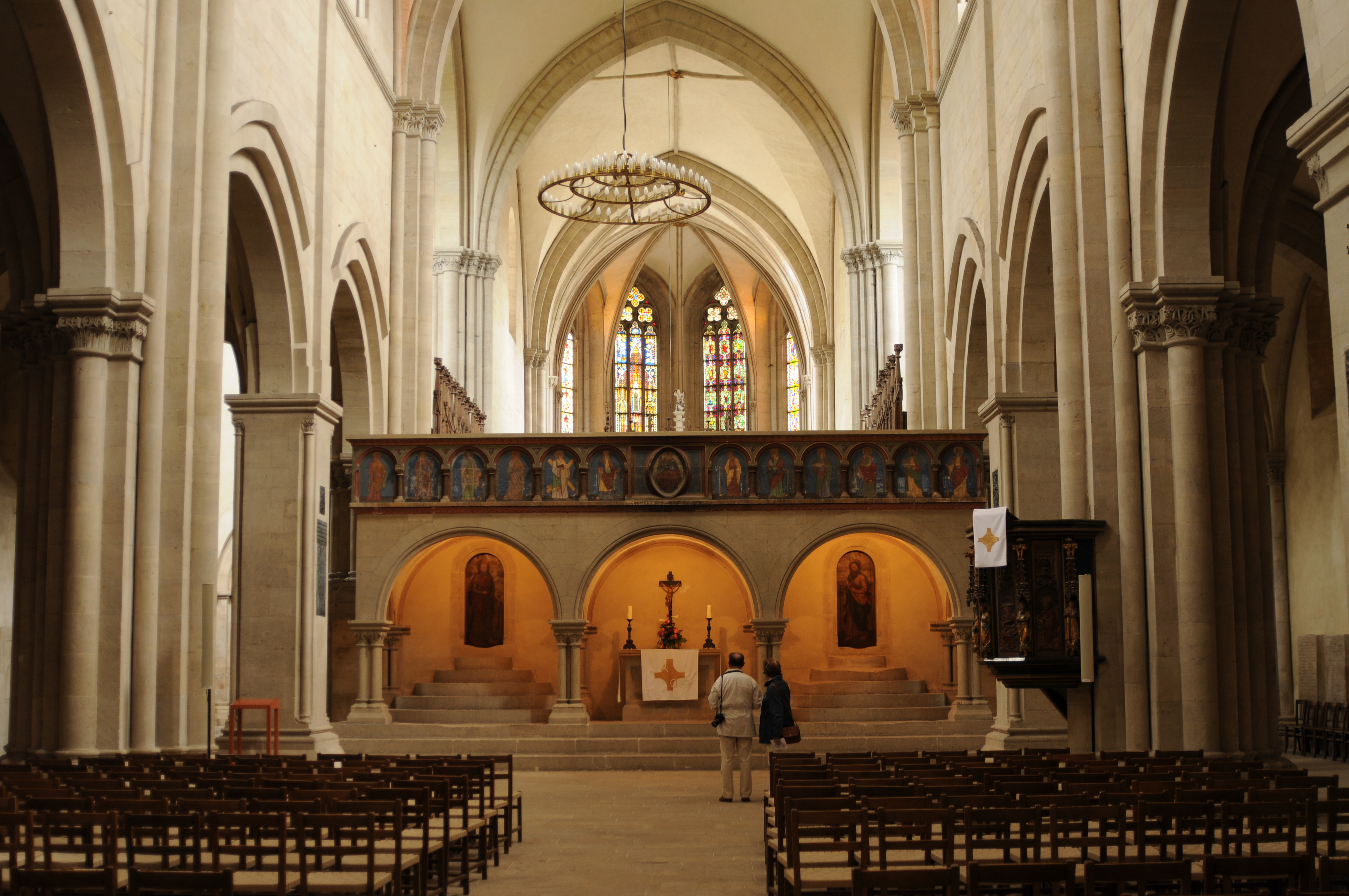 Dom St. Peter und Paul, Domplatz 16, 06618 Naumburg (Saale)